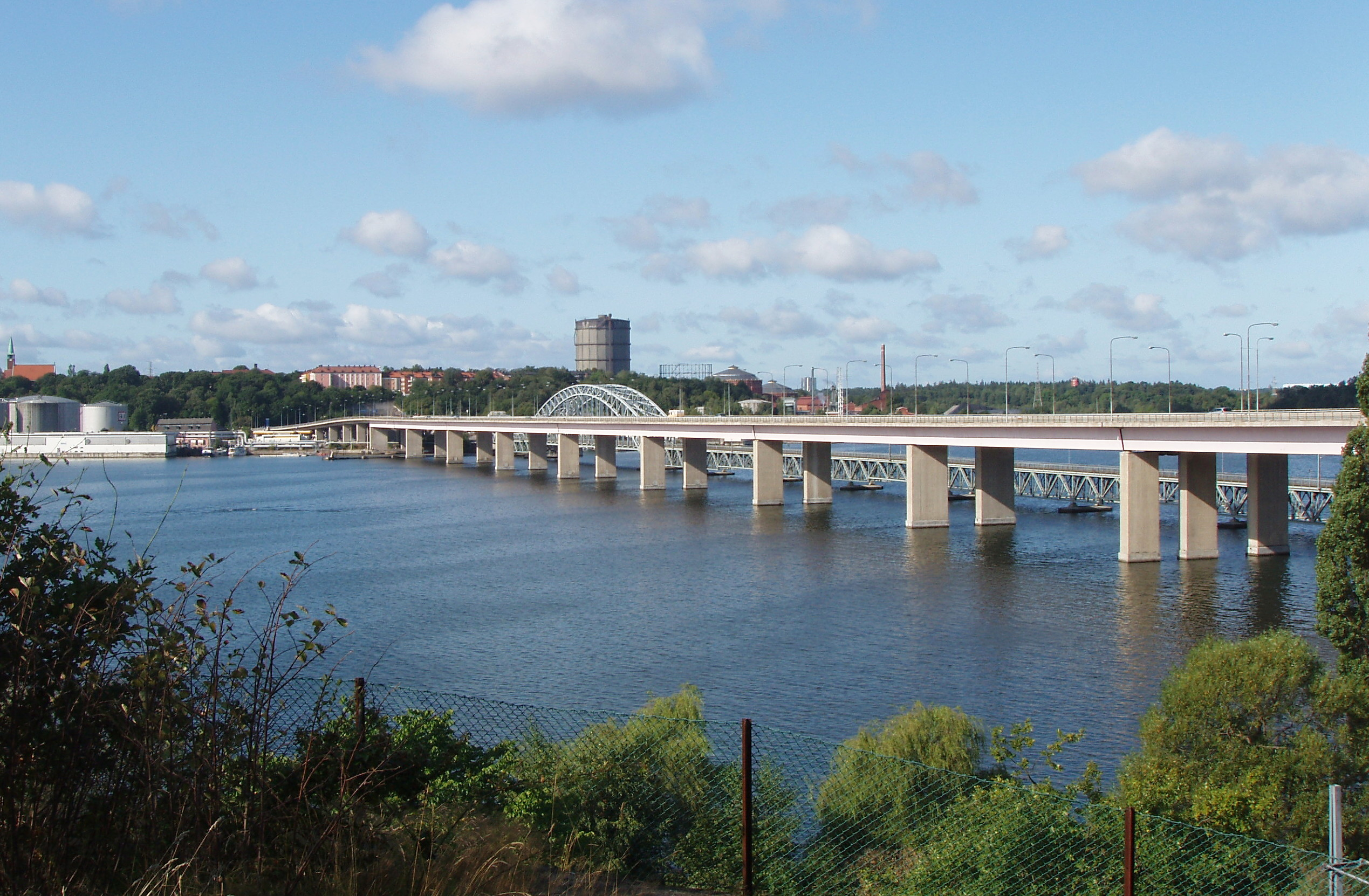 Nya och gamla Lidingöbron med vy söder om brofästet på Lidingö.